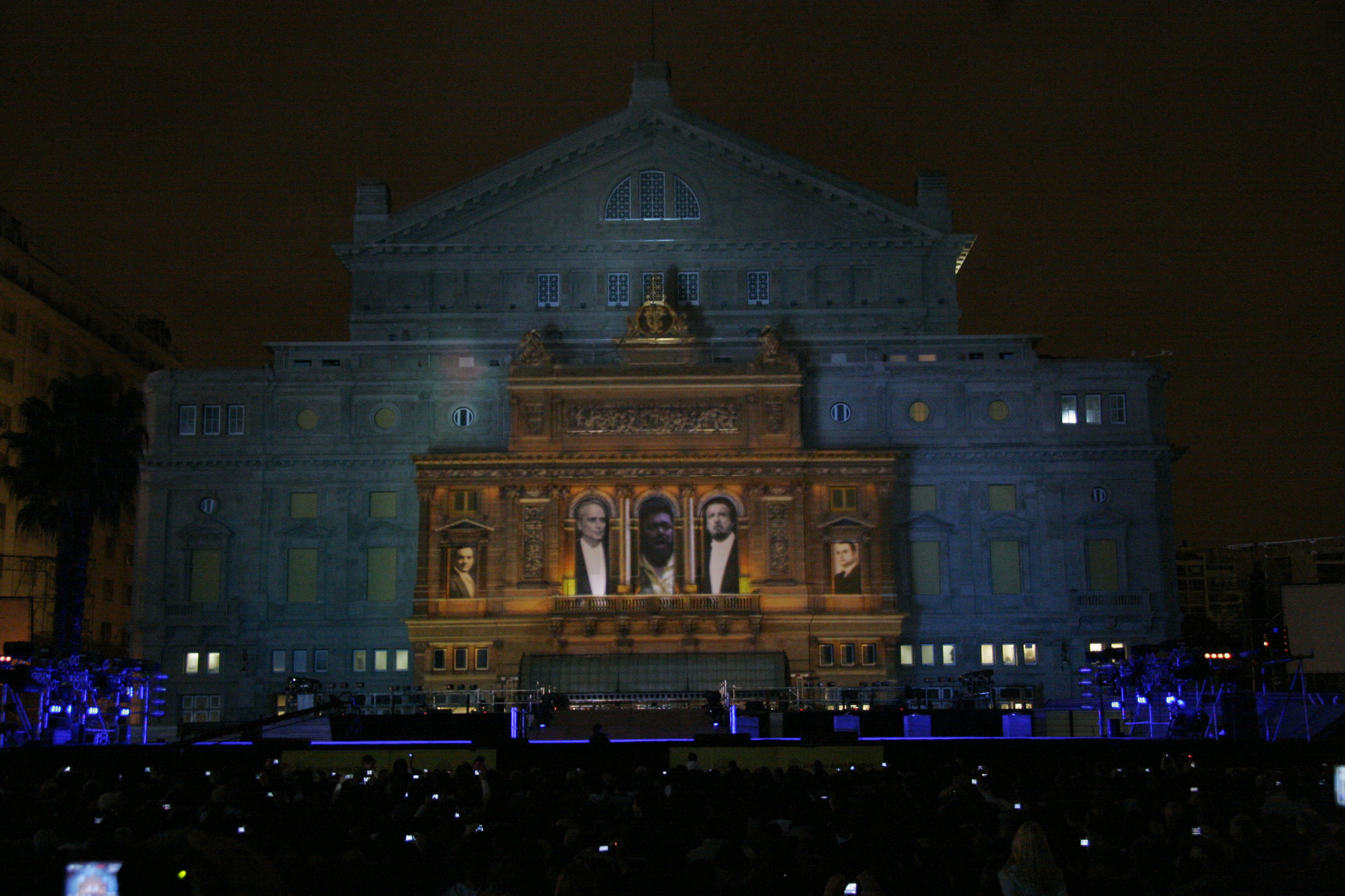 Gala de reapertura del Teatro Colón. Vista exterior del Teatro.